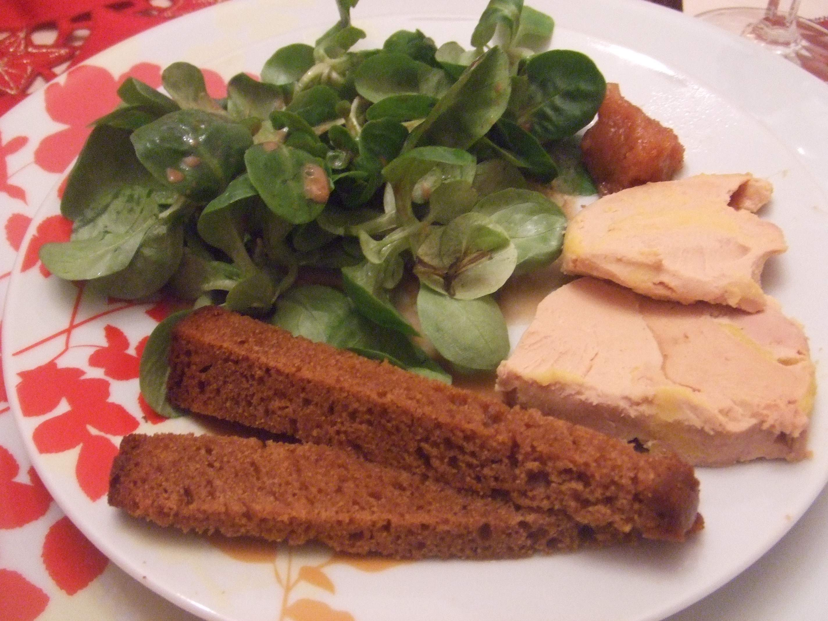 Foie gras et pain d'épice à Elsenheim (Bas-Rhin, France).